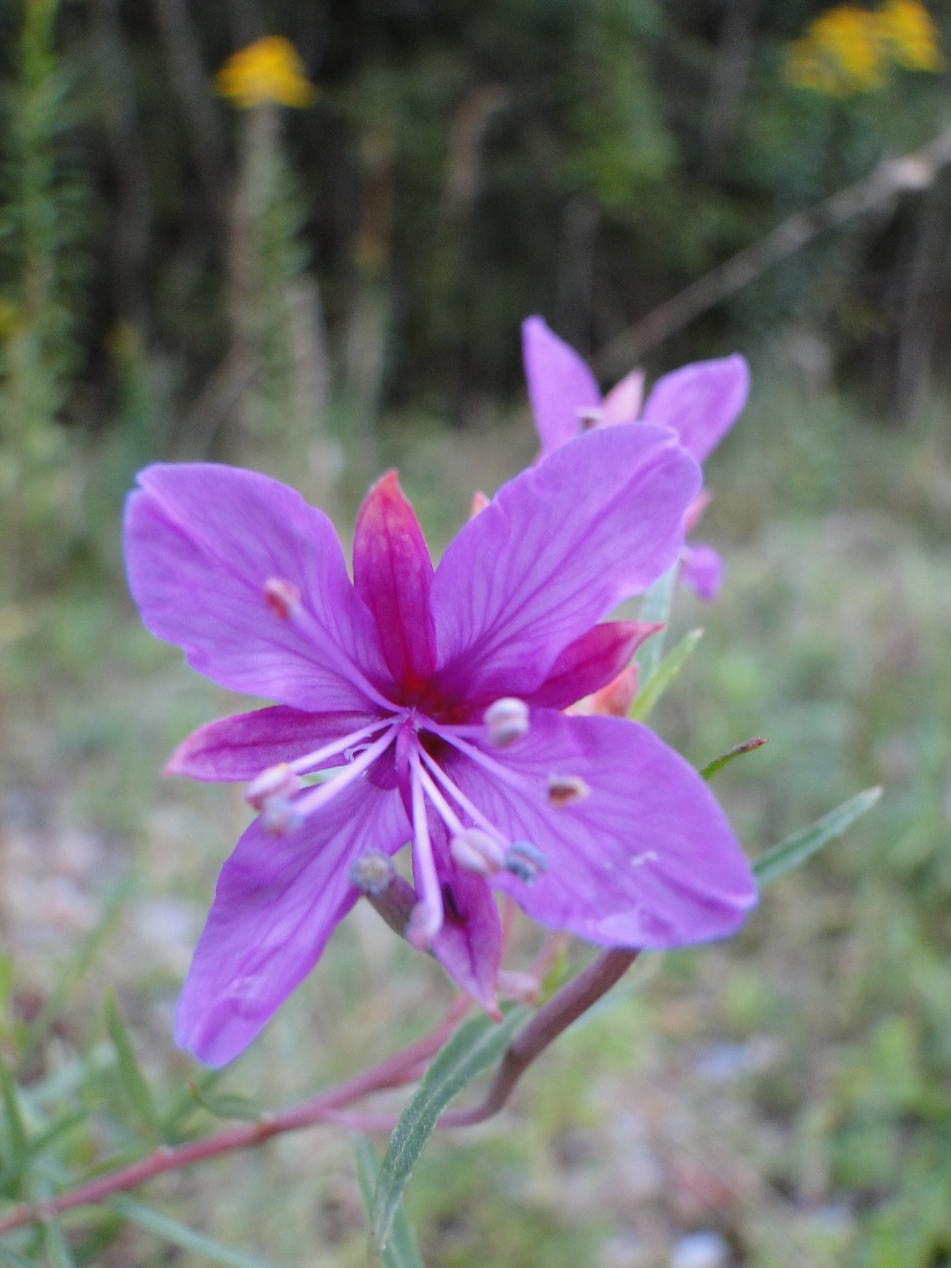 Rosmarin-Weidenröschen im Naturschutzgebiet Kiesgrube Aitrach